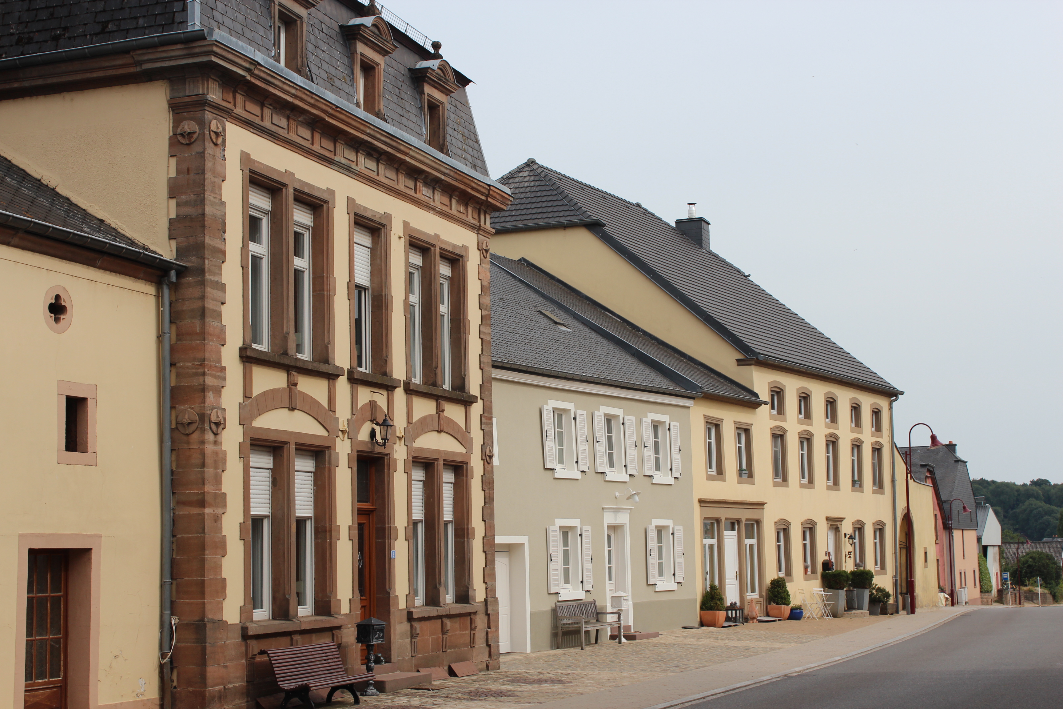 Haiser op Nummer 8, 10 an 12 an der Mierscher Strooss zu Groussbus; zënter dem 3 .September 2009 op d'Lëscht vum Zousaz-Inventaire vun den nationale Monumenter agedroen.